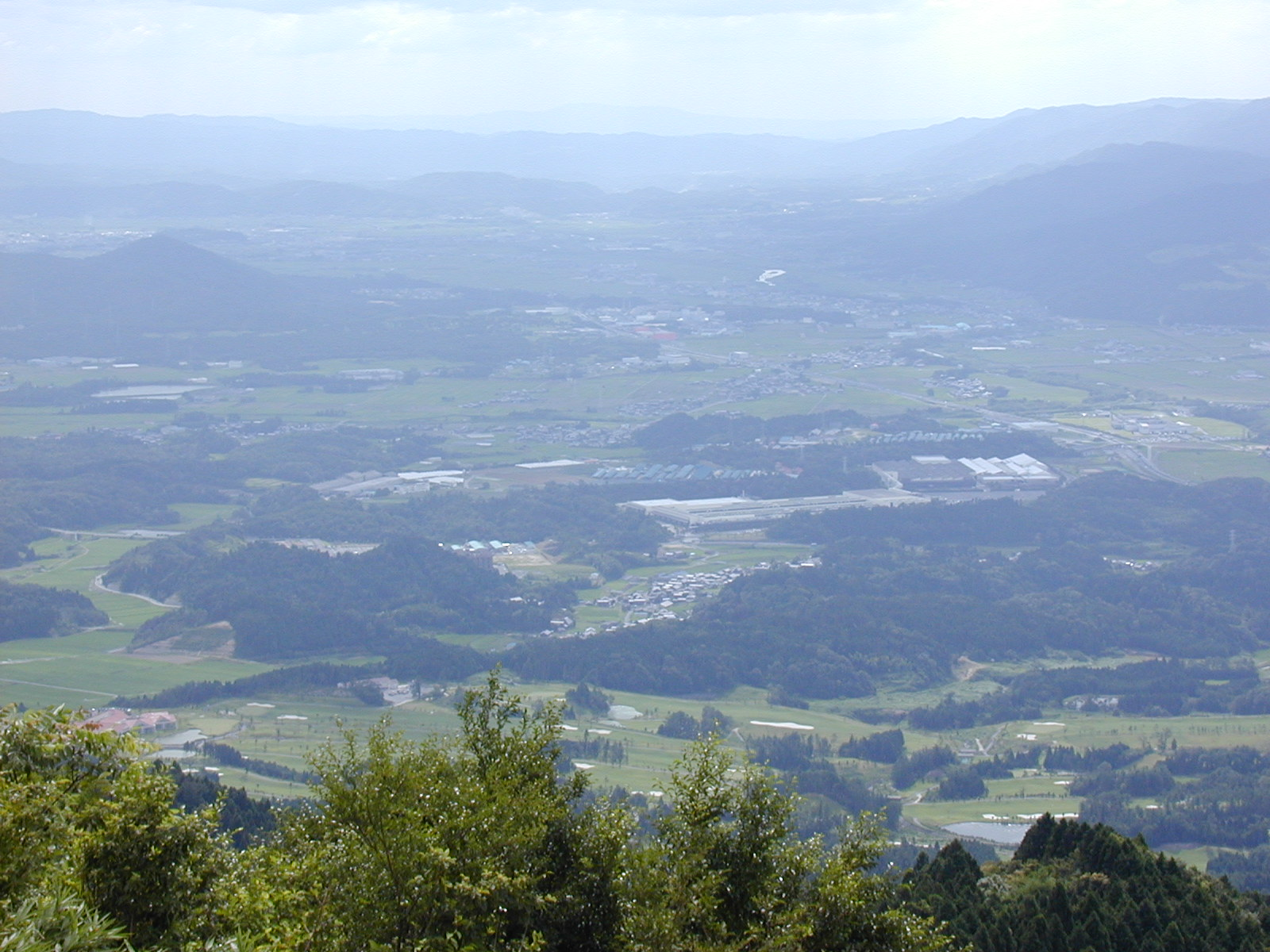 霊山山頂から望む伊賀盆地